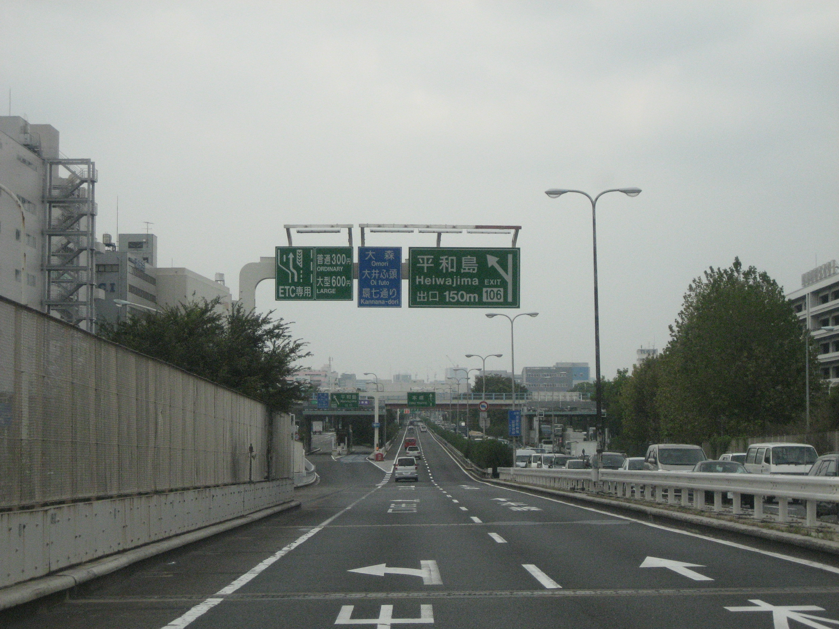 首都高速羽田線平和島出口付近